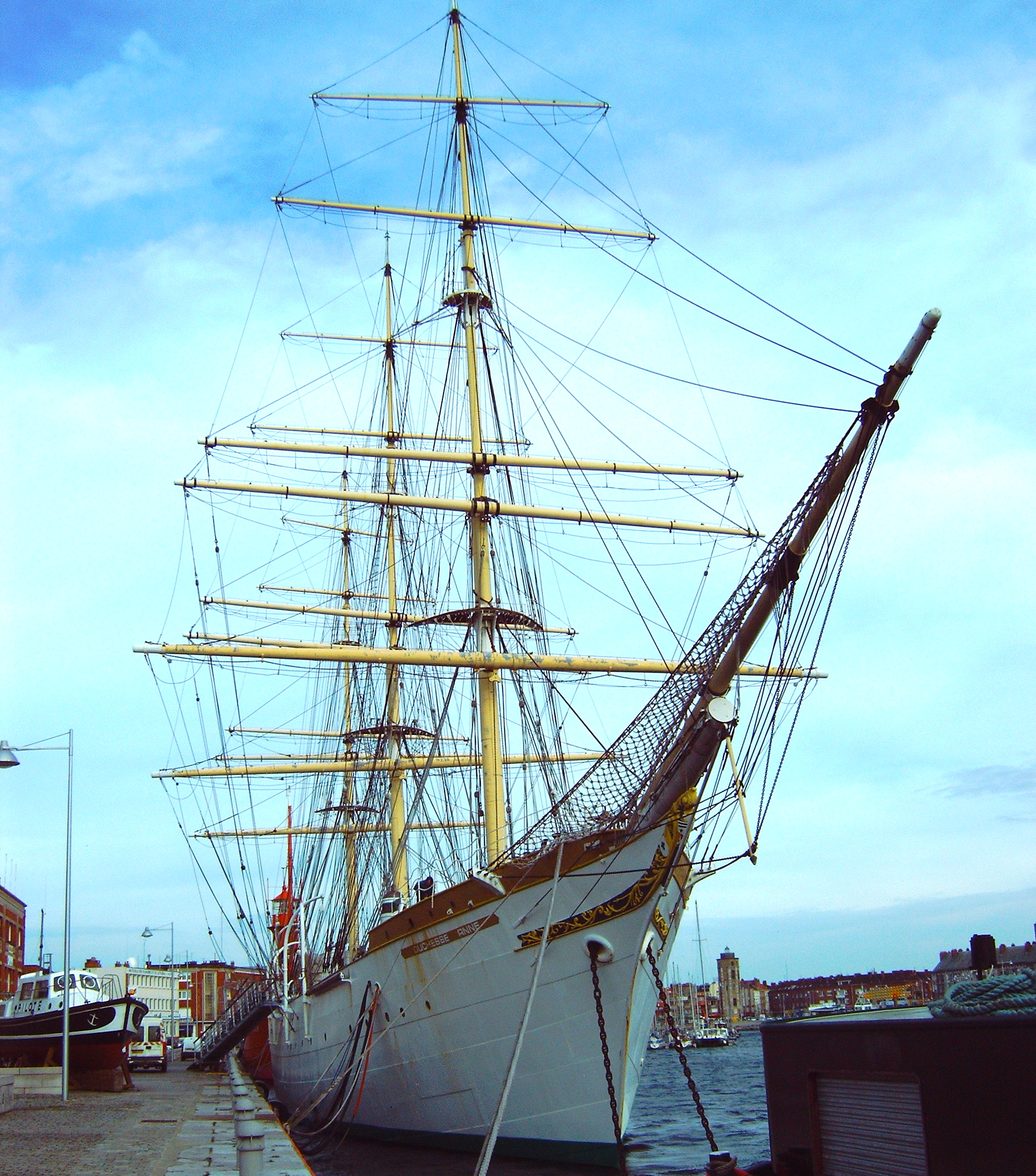 Le trois-mâts carré Duchesse Anne est un bateau-musée datant de 1901 (Musée portuaire de Dunkerque, Nord, France).